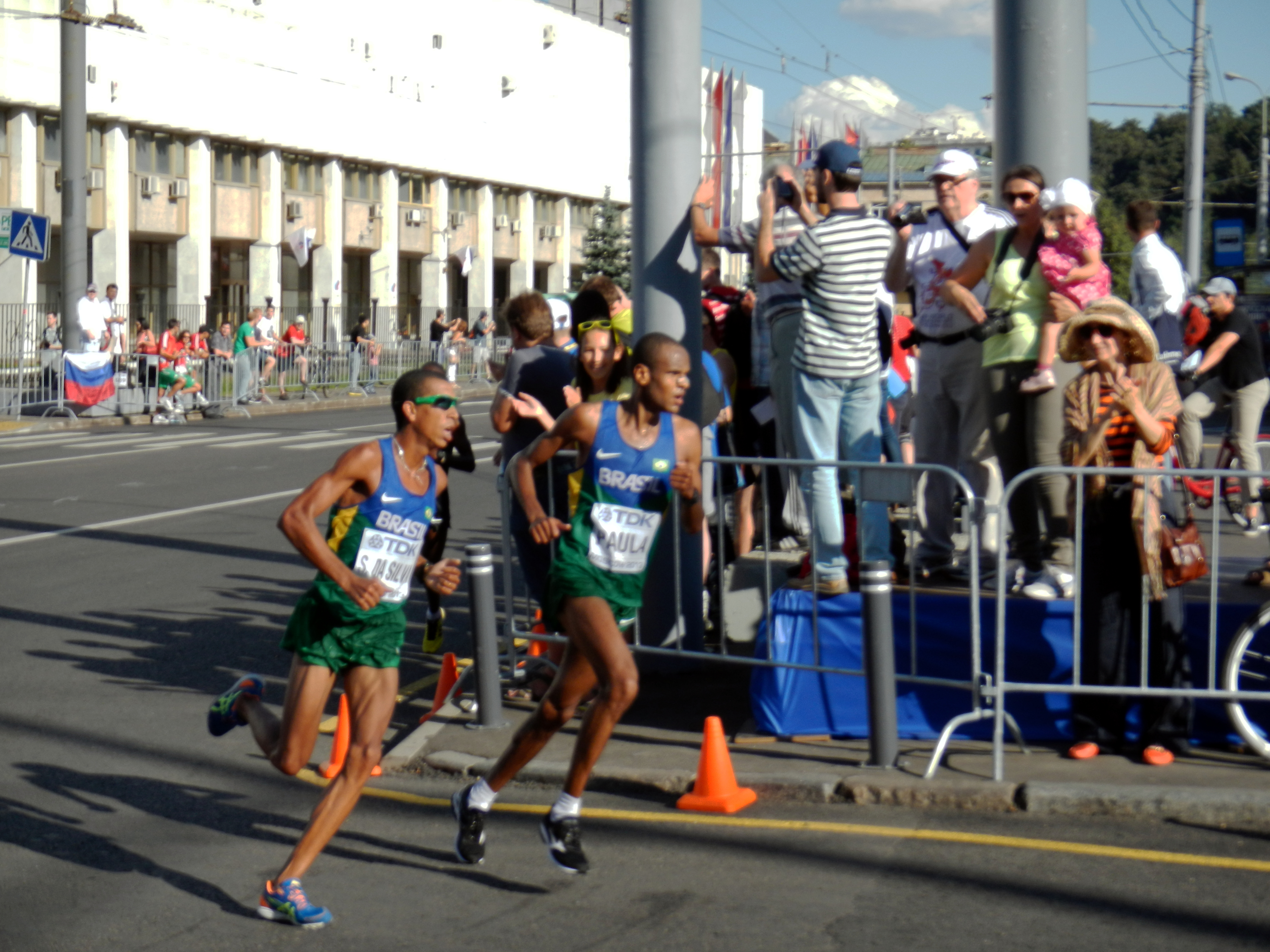 7 (222) Paulo Roberto Paula (Brazil) 2:11:40 6 (214) Solonei Da Silva (Brazil) 2:11:40